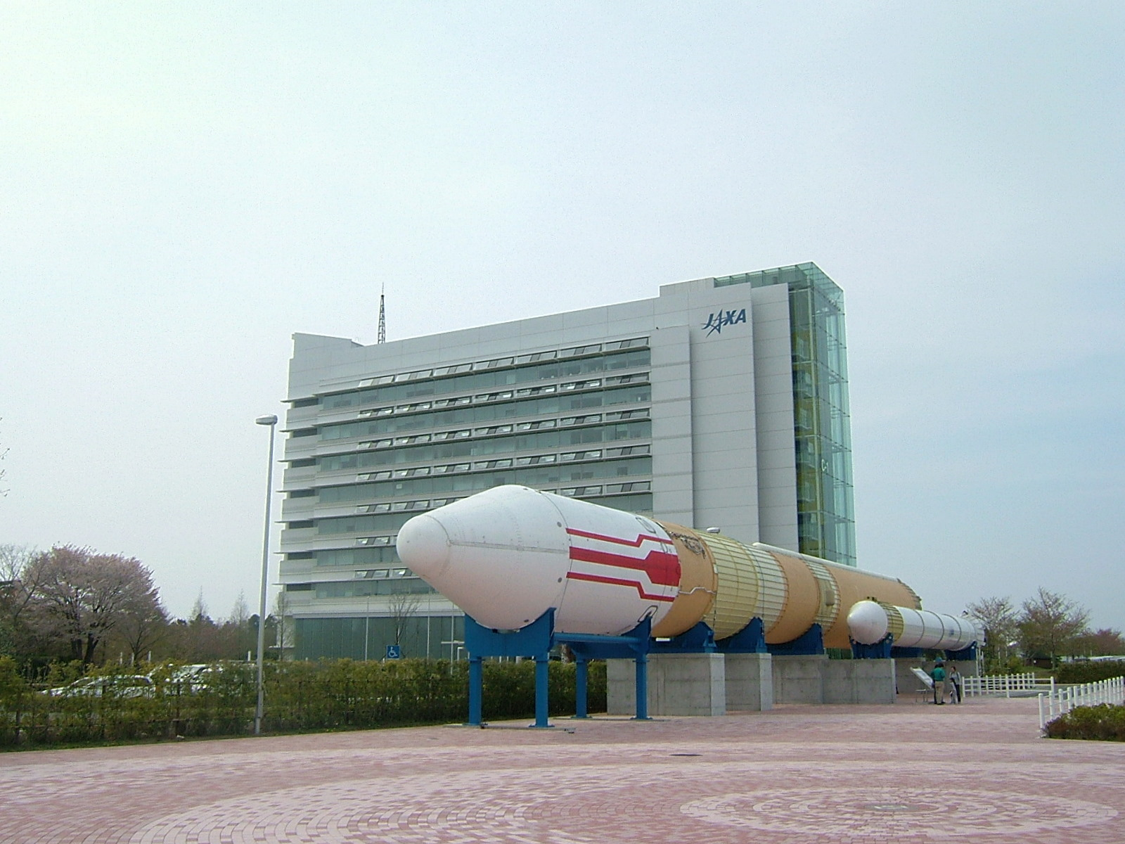 広報・情報棟前からＨ－Ⅱロケット、総合開発推進棟を写す